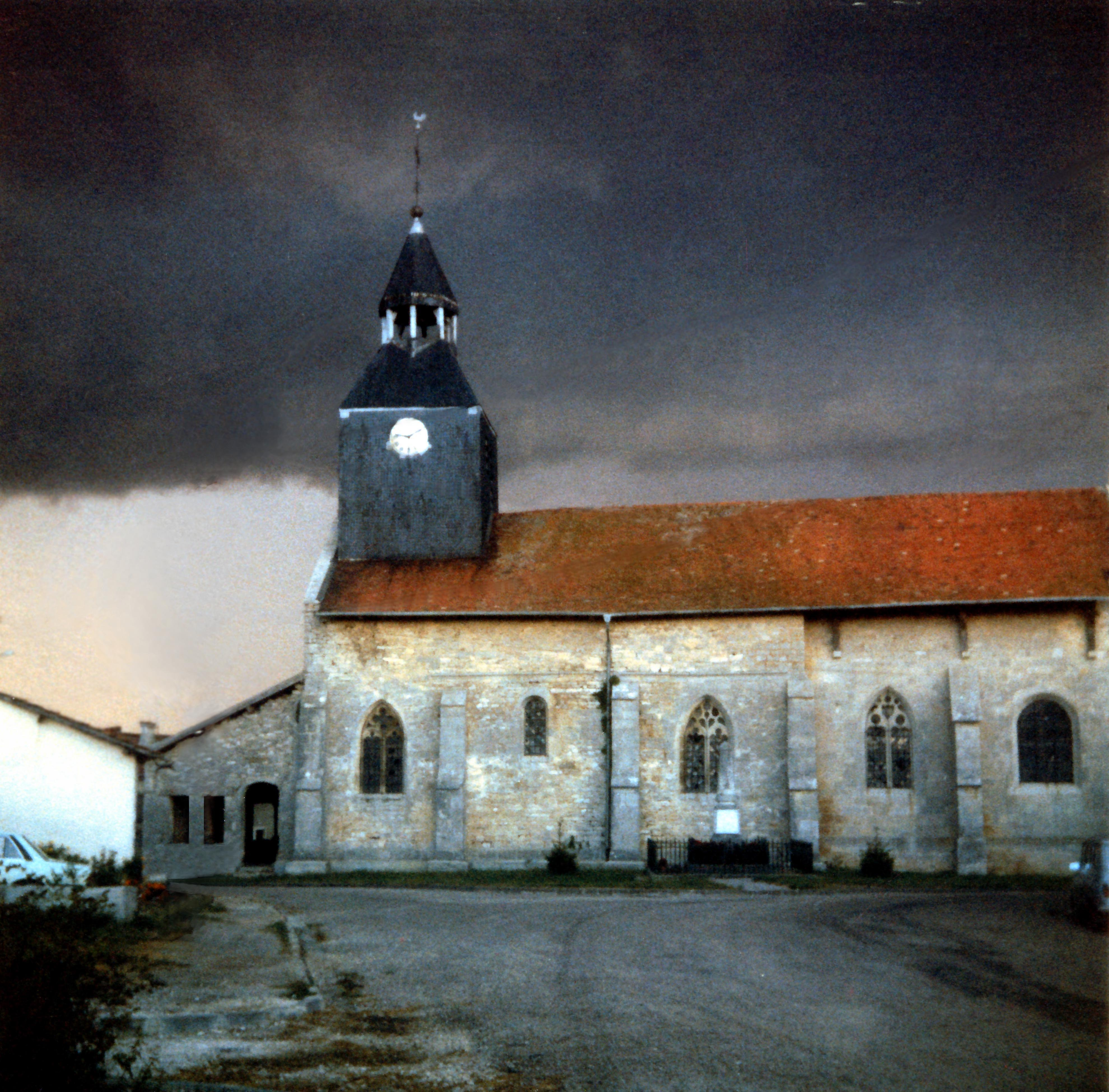 Église Saint-Bénigne de Domblain (52). Vue méridionale.